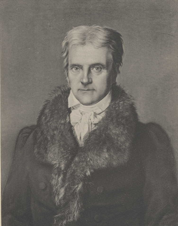 Bild des Greifswalder Professors Franz Christian Gesterding (gest. 1841)